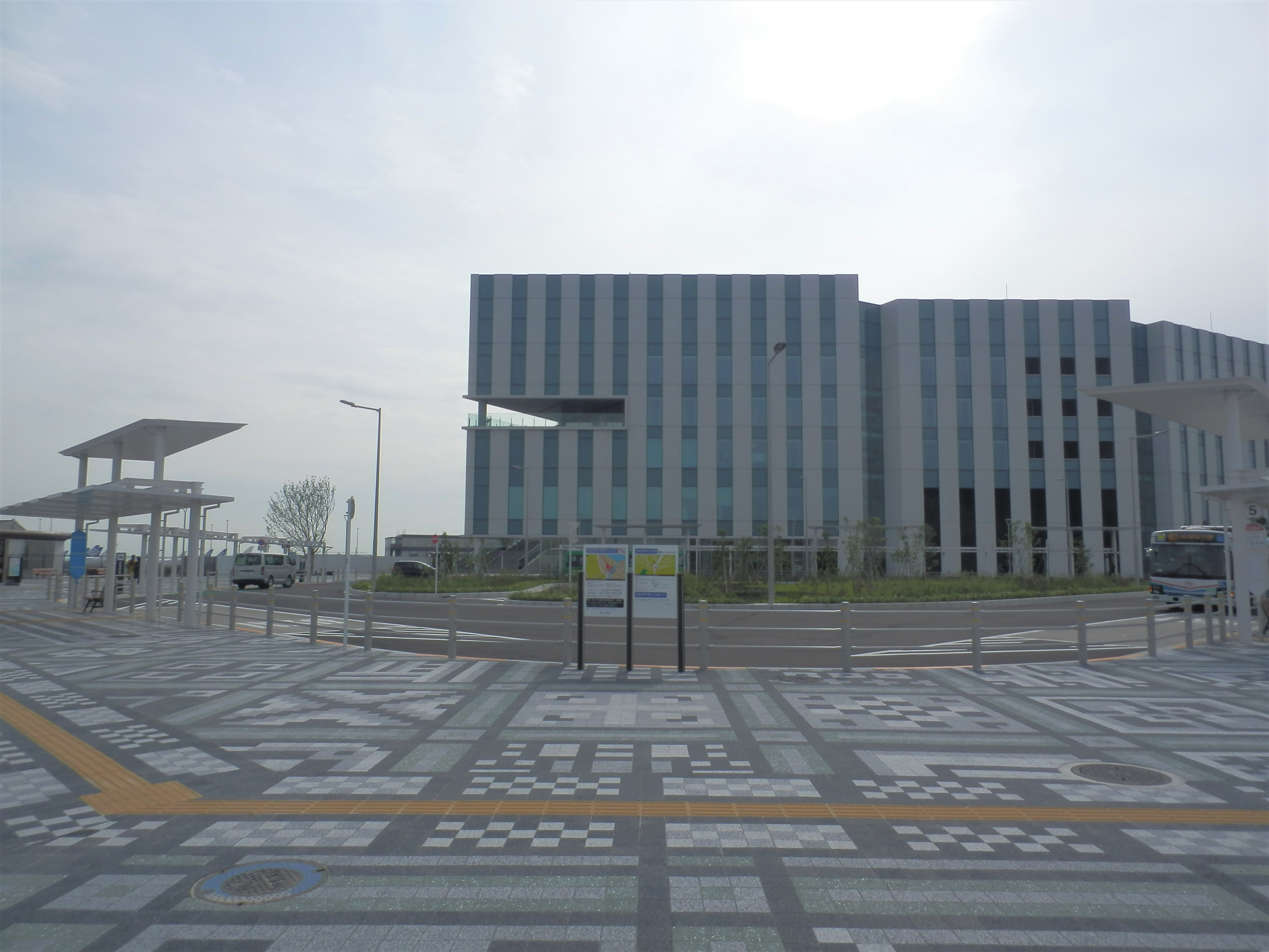 天空橋駅交通広場